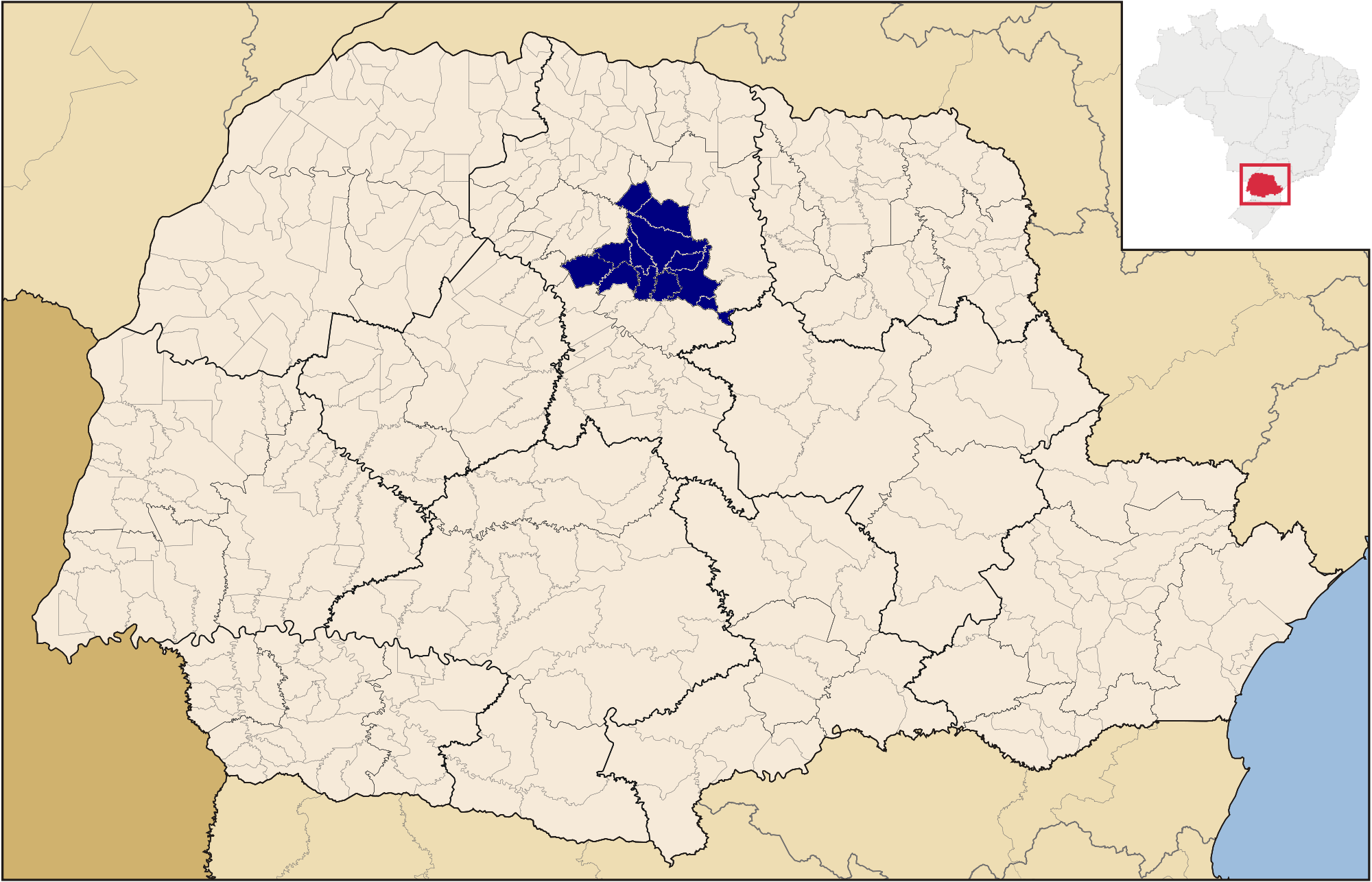 referencia ao projeto da RM de Apucarana 1998